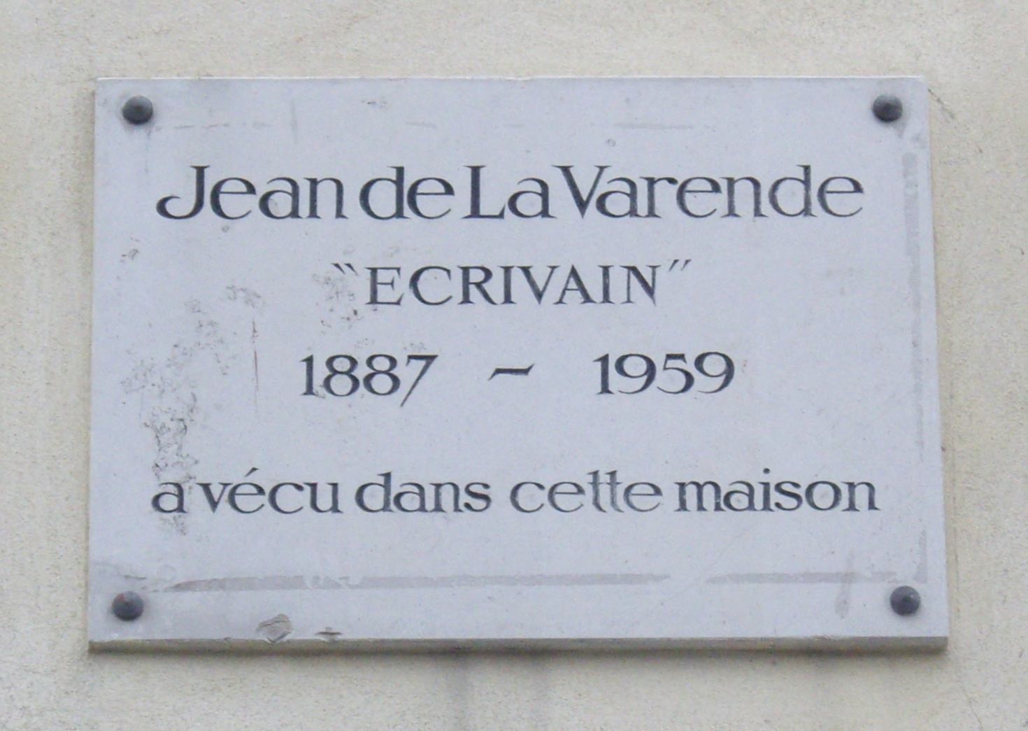 Plaque commémorative, 165 rue du Faubourg-Saint-Honoré, Paris 8e. « Jean de La Varende, écrivain, 1887-1959, a vécu dans cette maison. »